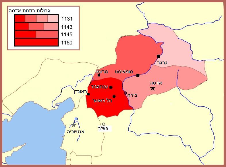 גבולות רוזנות אדסה